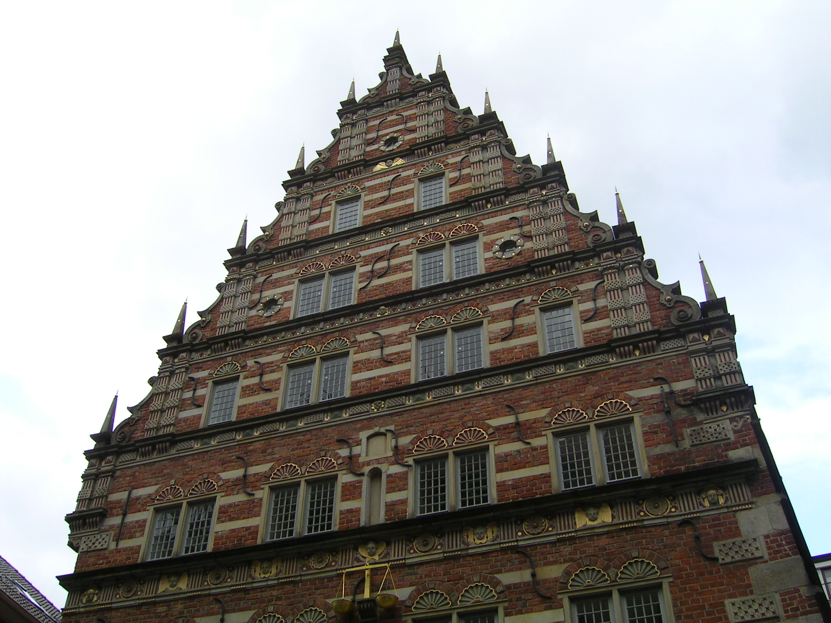 Built in 1586/88 by L. von Bentheim. Rebuilt again after WWII Address: Kulturhaus Stadtwaage - ein Gebäude der Sparkasse Bremen Langenstr. 13 28195 Bremen (Mitte) Germany Kulturhaus Stadtwaage Bremen - Info Plate 53°04′35.04″N 8°48′19.88″E / 53.0764°N 8.8055222°EUser:Tarawneh/rami